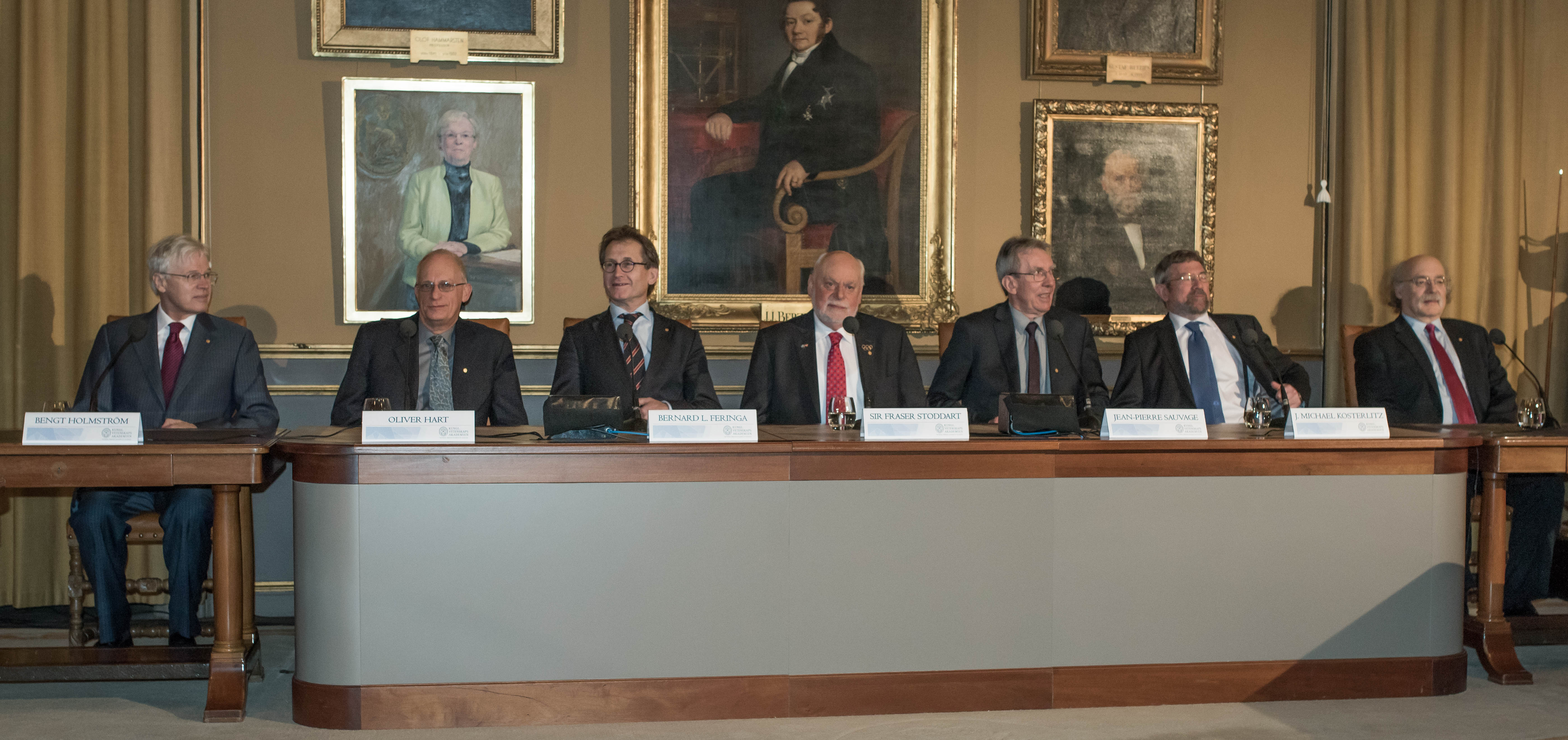 Nobel Prize 2016 Nobel Laureates 2016